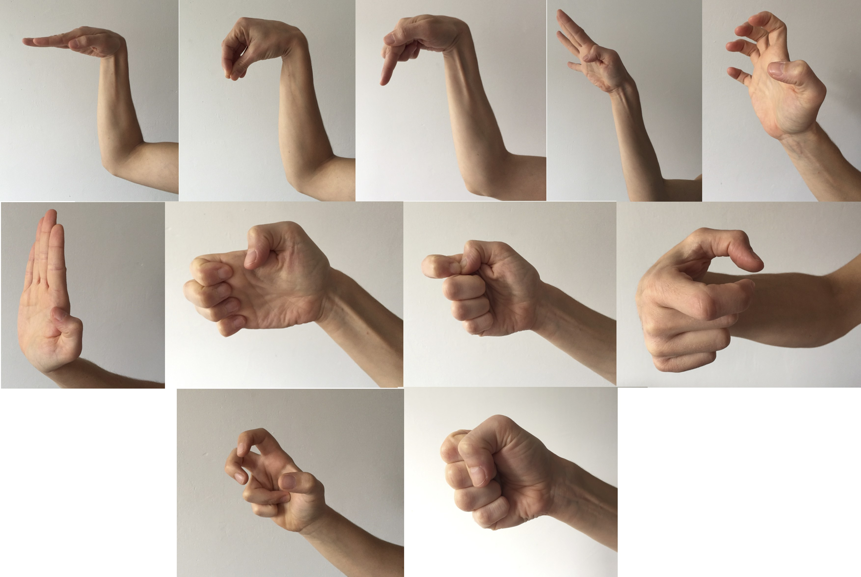 Les styles à mains nues en Mansuria Kung Fu